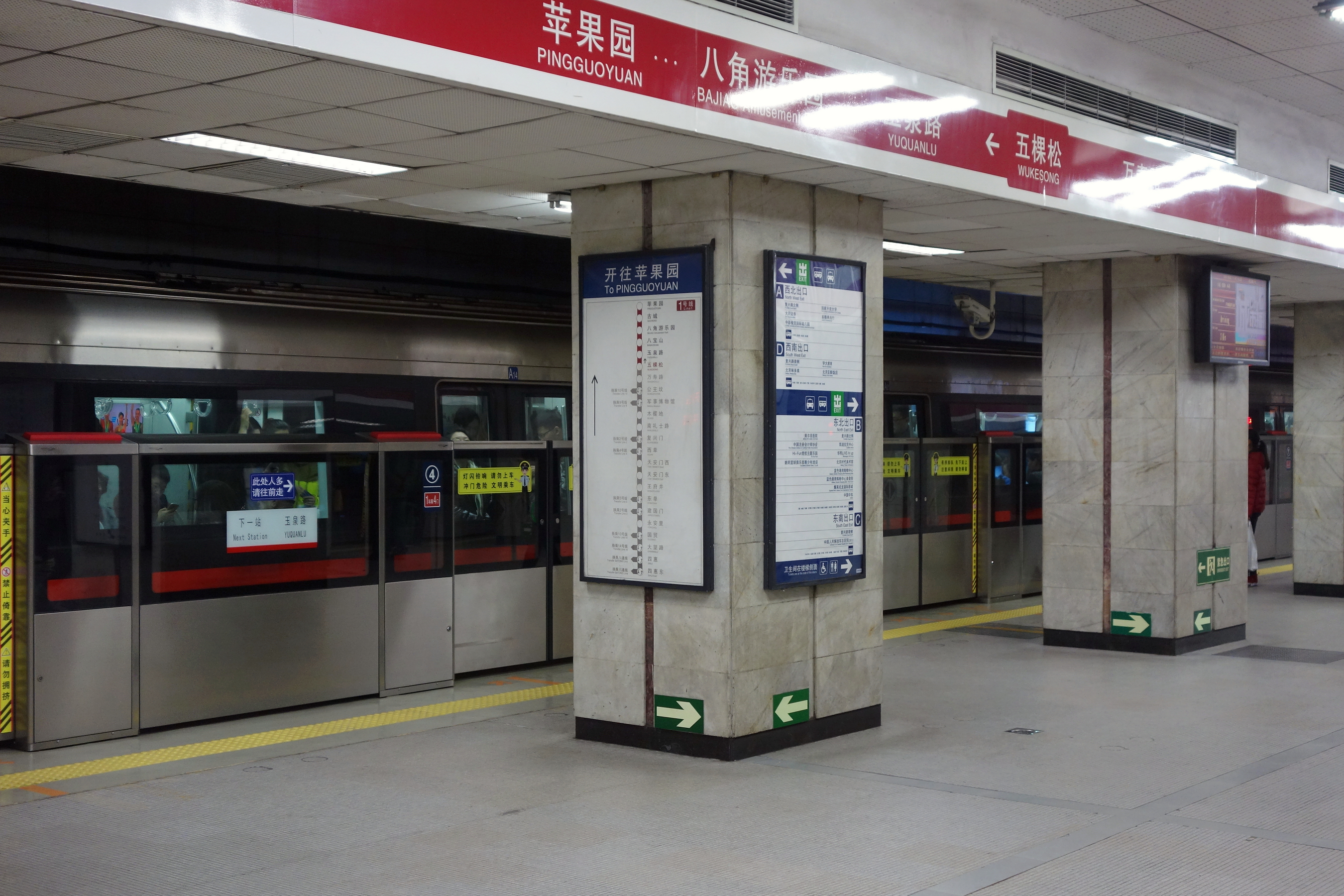 北京地铁1号线五棵松站站台。站台加装半高式屏蔽门，2017年投入使用。